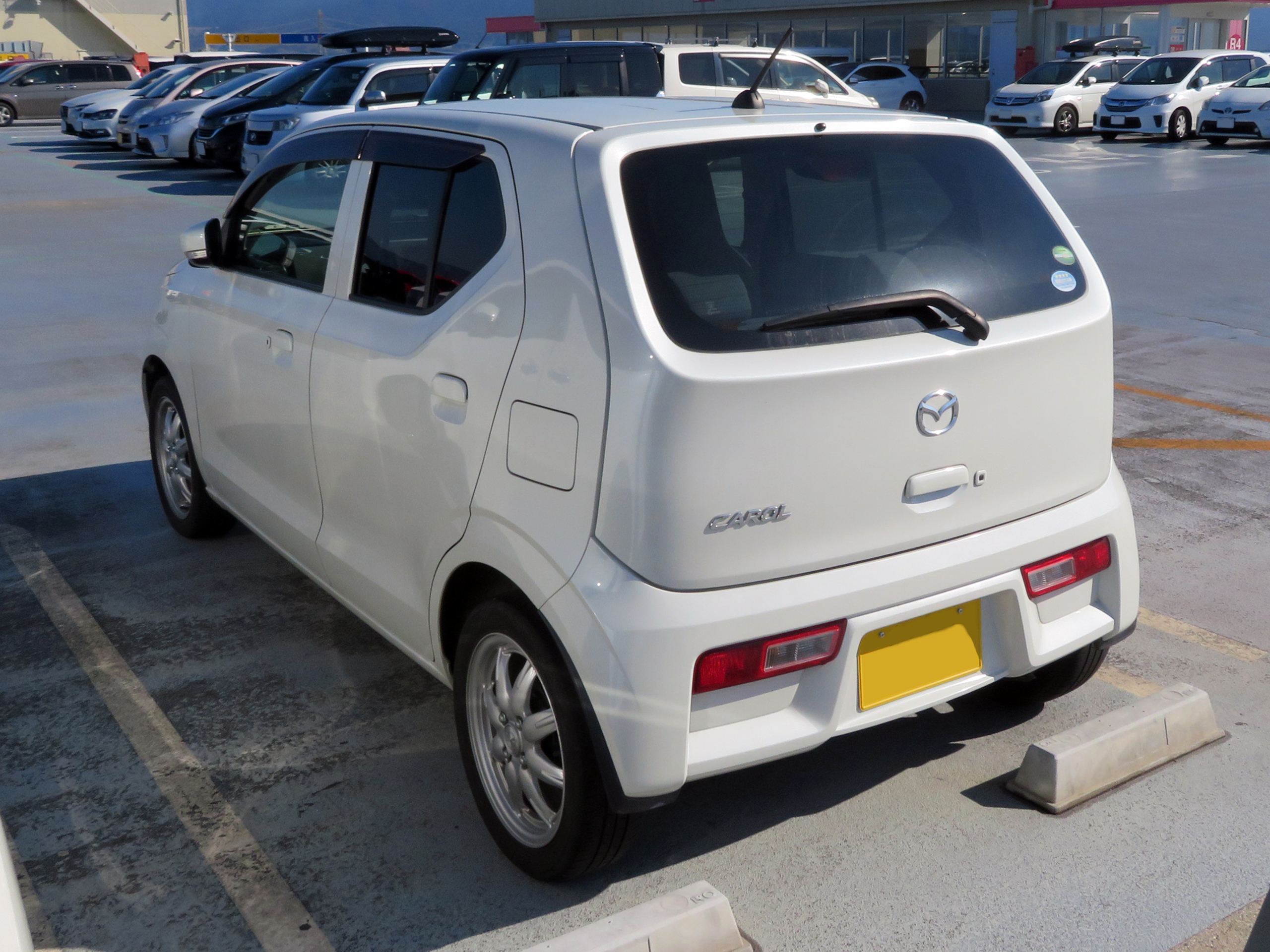 DBA-HB36S型マツダ・キャロルGXをリアから撮影。